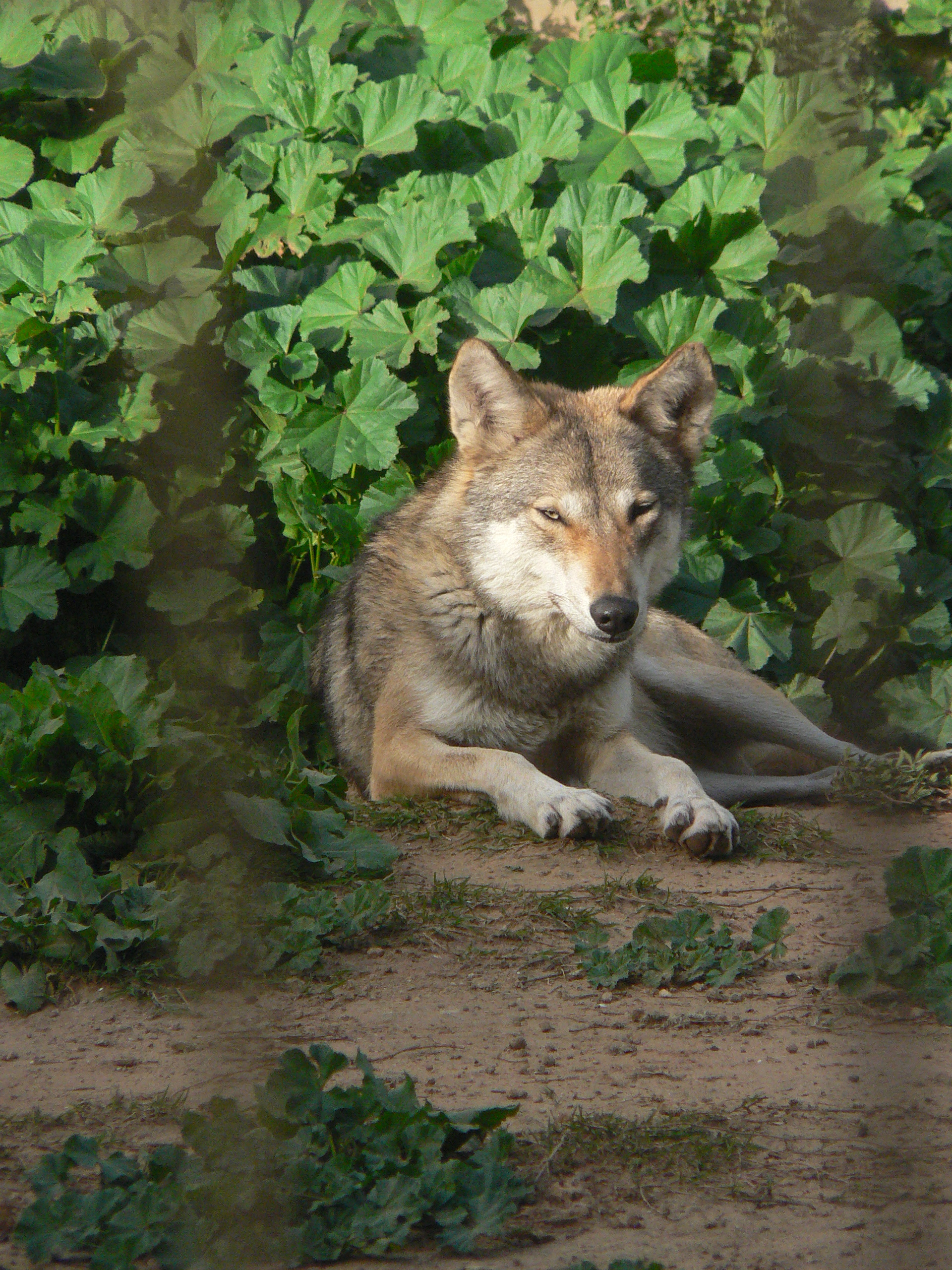 צולם בגן הזואולוגי בת"א Taken in Tel Aviv Zoological Gardens זאב Wolf